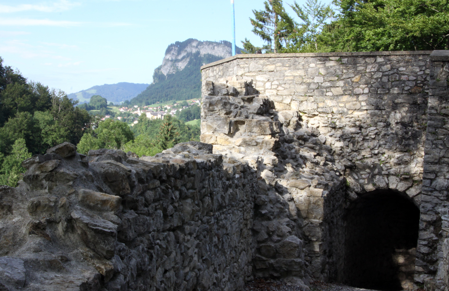 Tor der Barbakane von Alt-Ems.